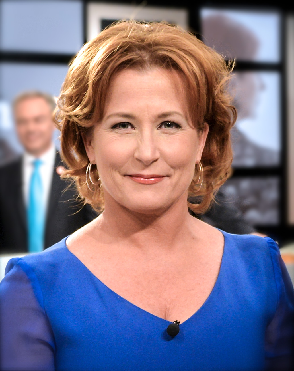 Anna Hedenmo inför den avslutande partiledardebatten i SVT den 12 september 2014.